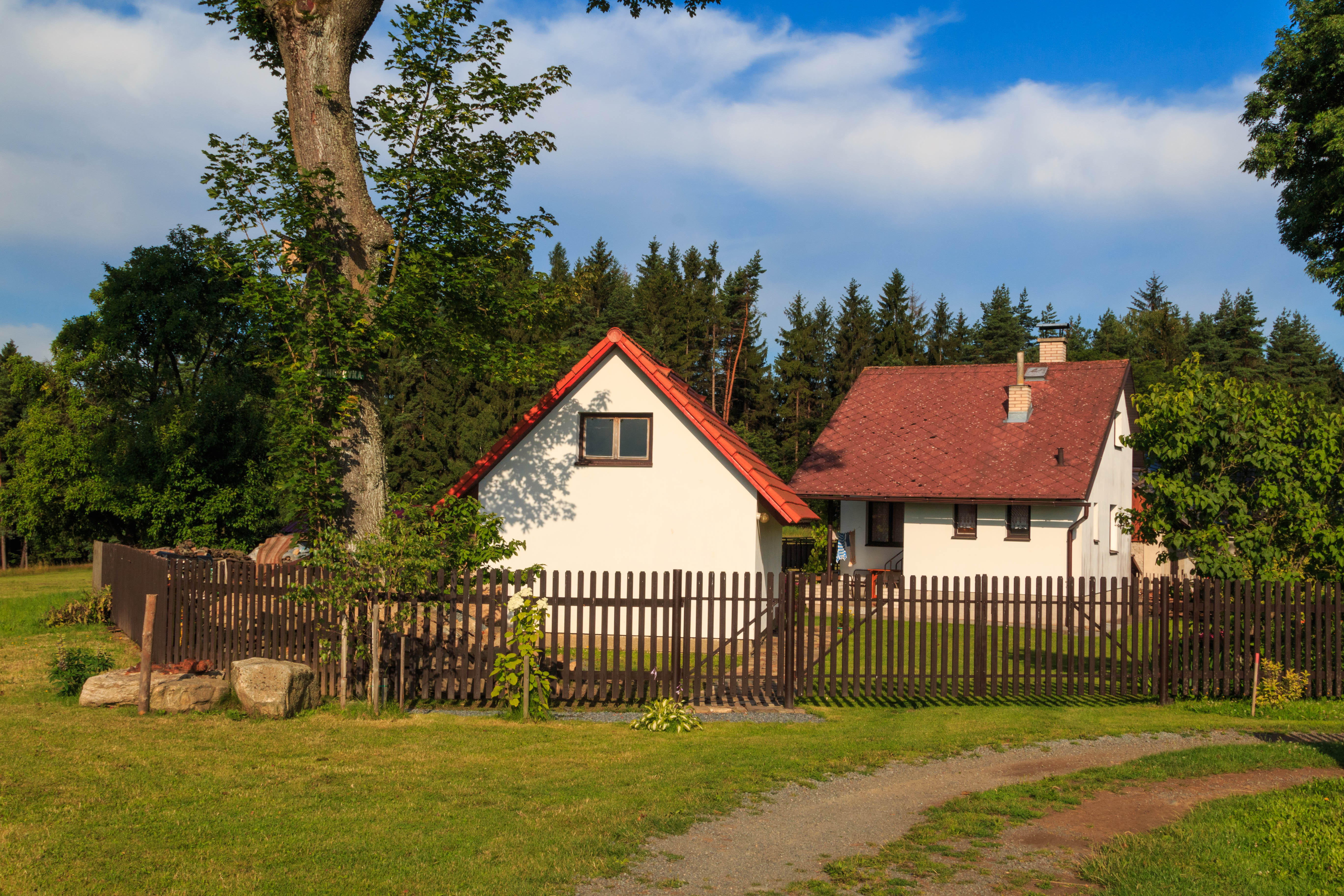 Nehodovka čp. 8